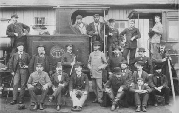 Orconerako trenbidea eta enpresako arduradunak